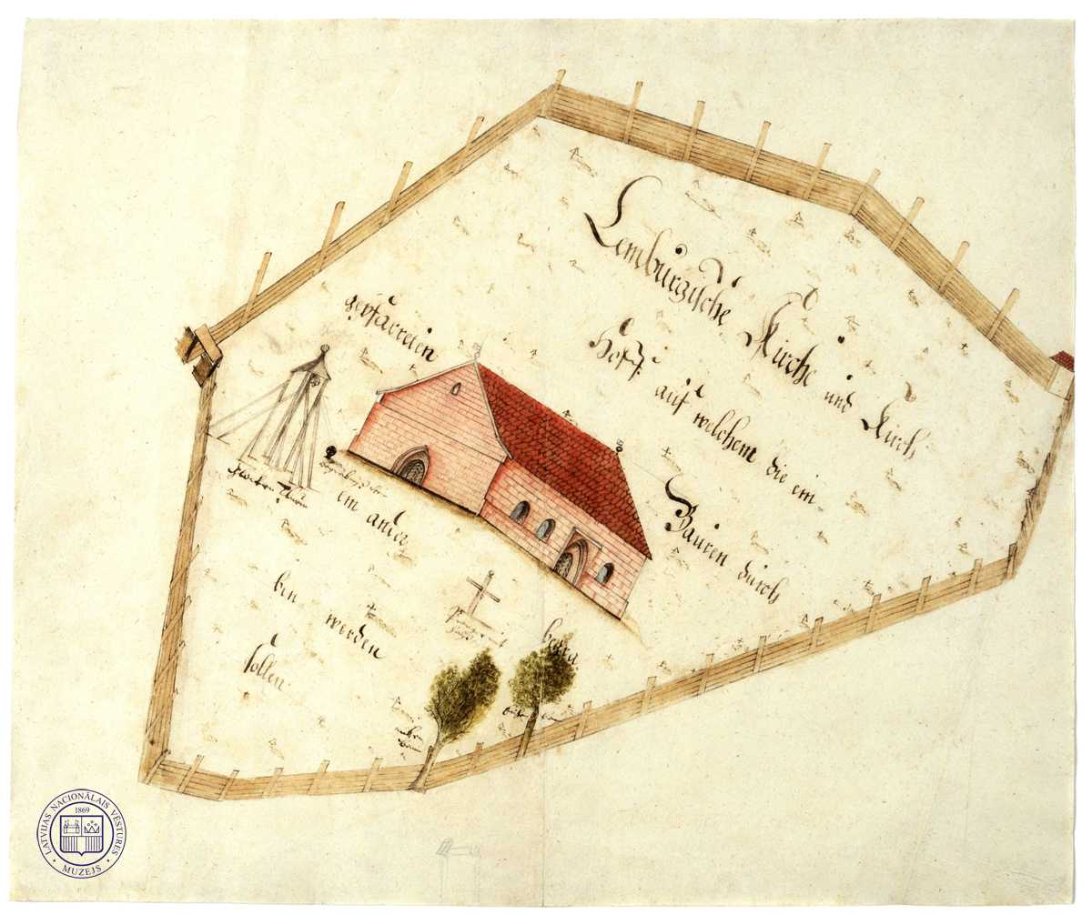 Joonistus XVII sajandist.